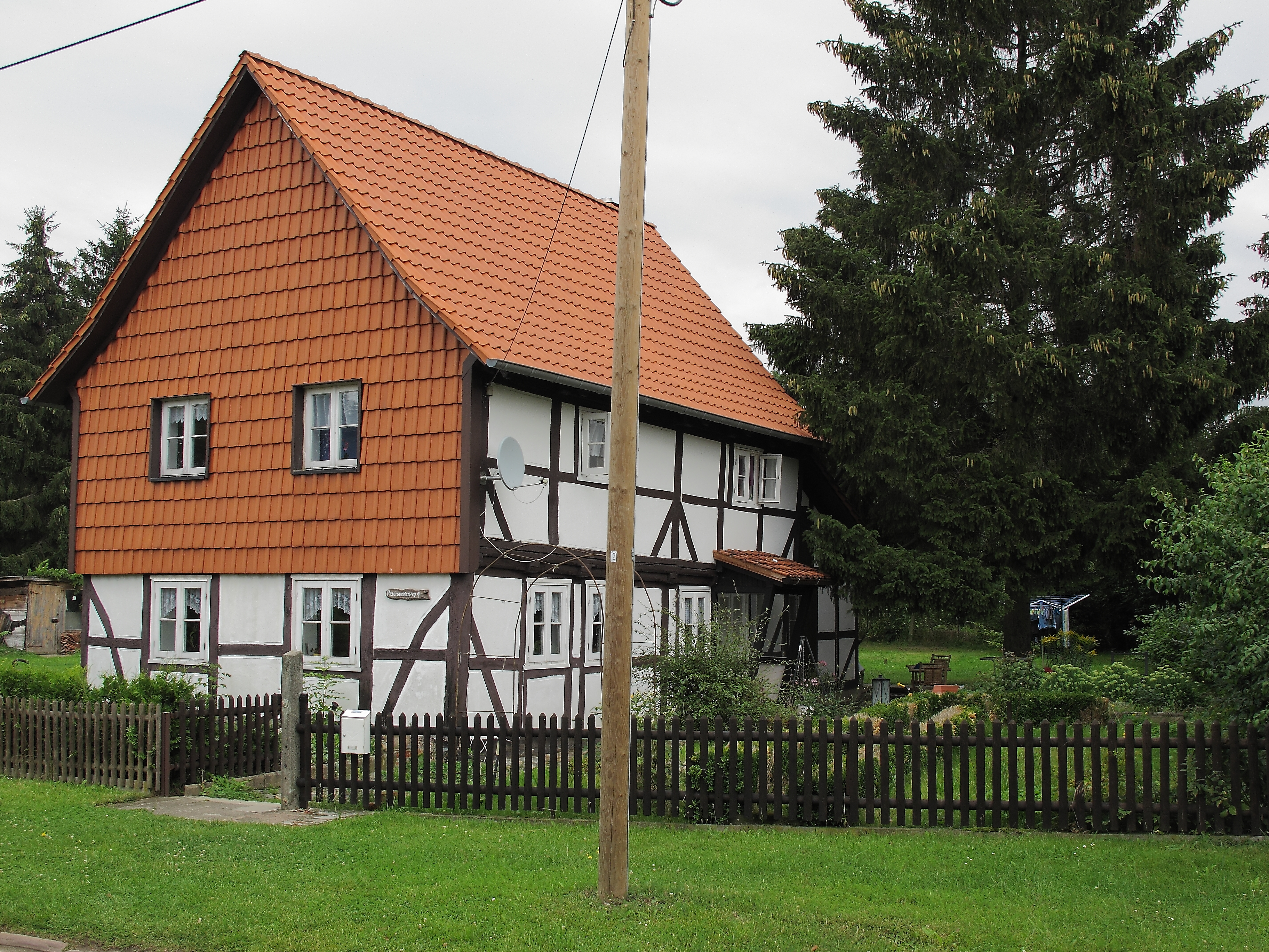 Wülperode Fachwerkhaus